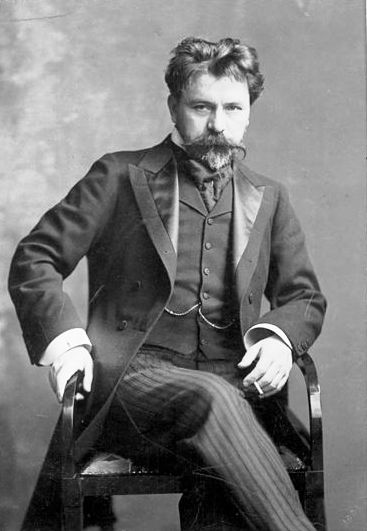 Portrait ("Kniestück") des Dirigenten Arthur Nikisch, Kabinettformat.